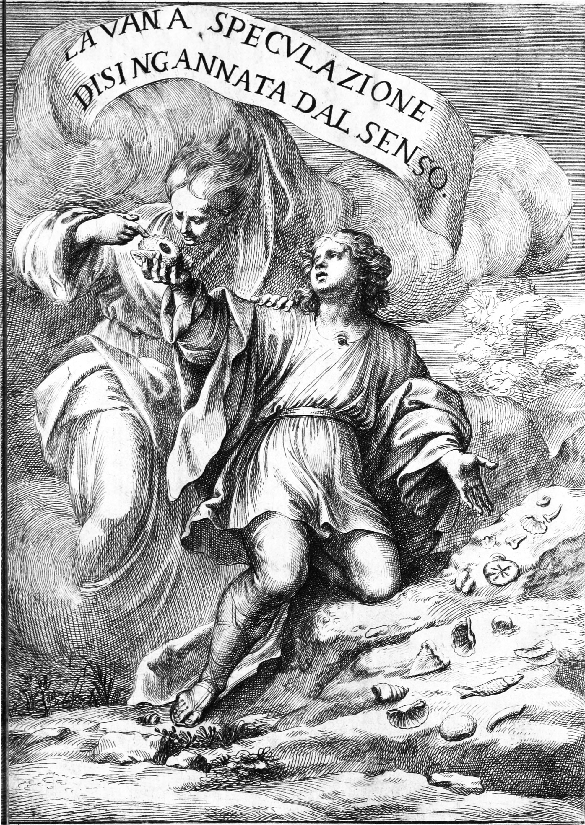 Frontispiece from La vana speculazione disingannata dal senso